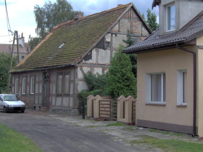 Budownictwo ryglowe w Nowym Warpnie. Autor: Maks Saczywko (Soczewa)